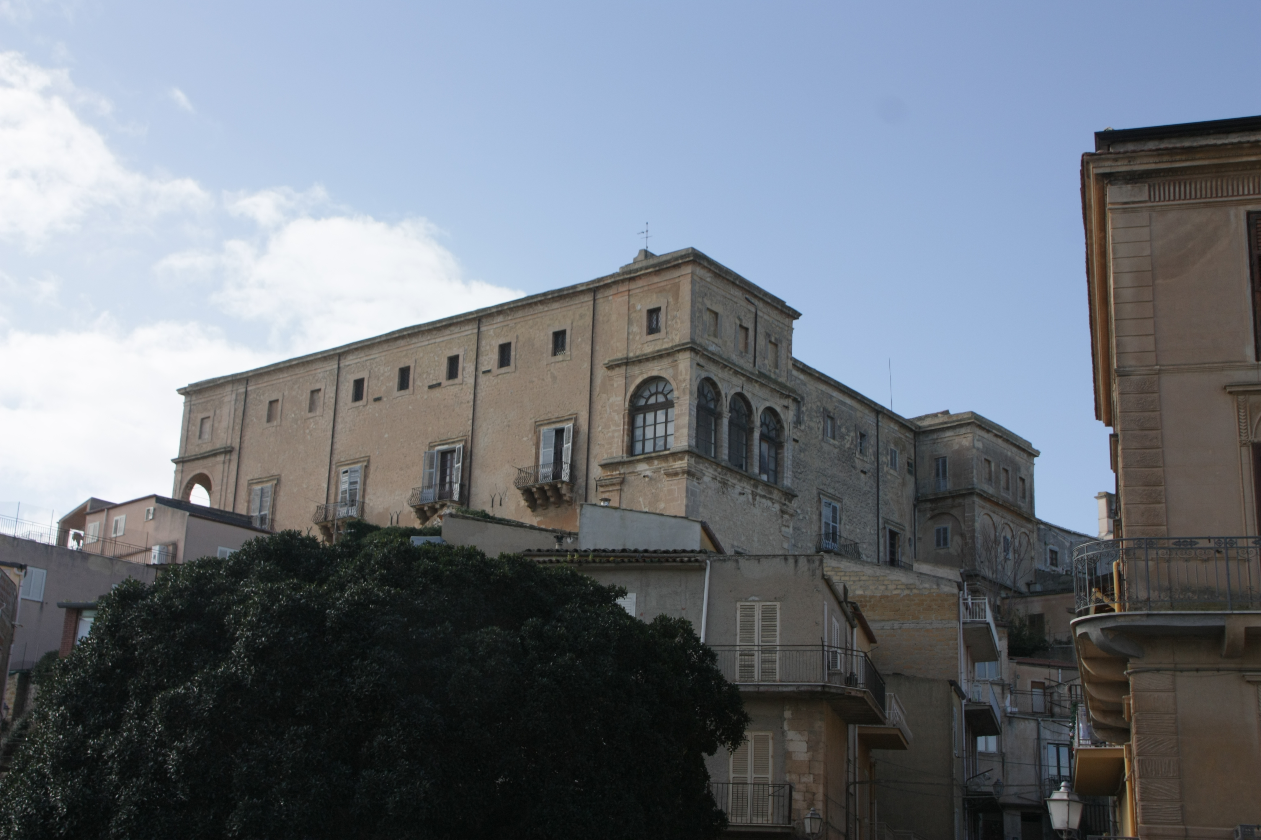 Opera Pia Principe di Aragona